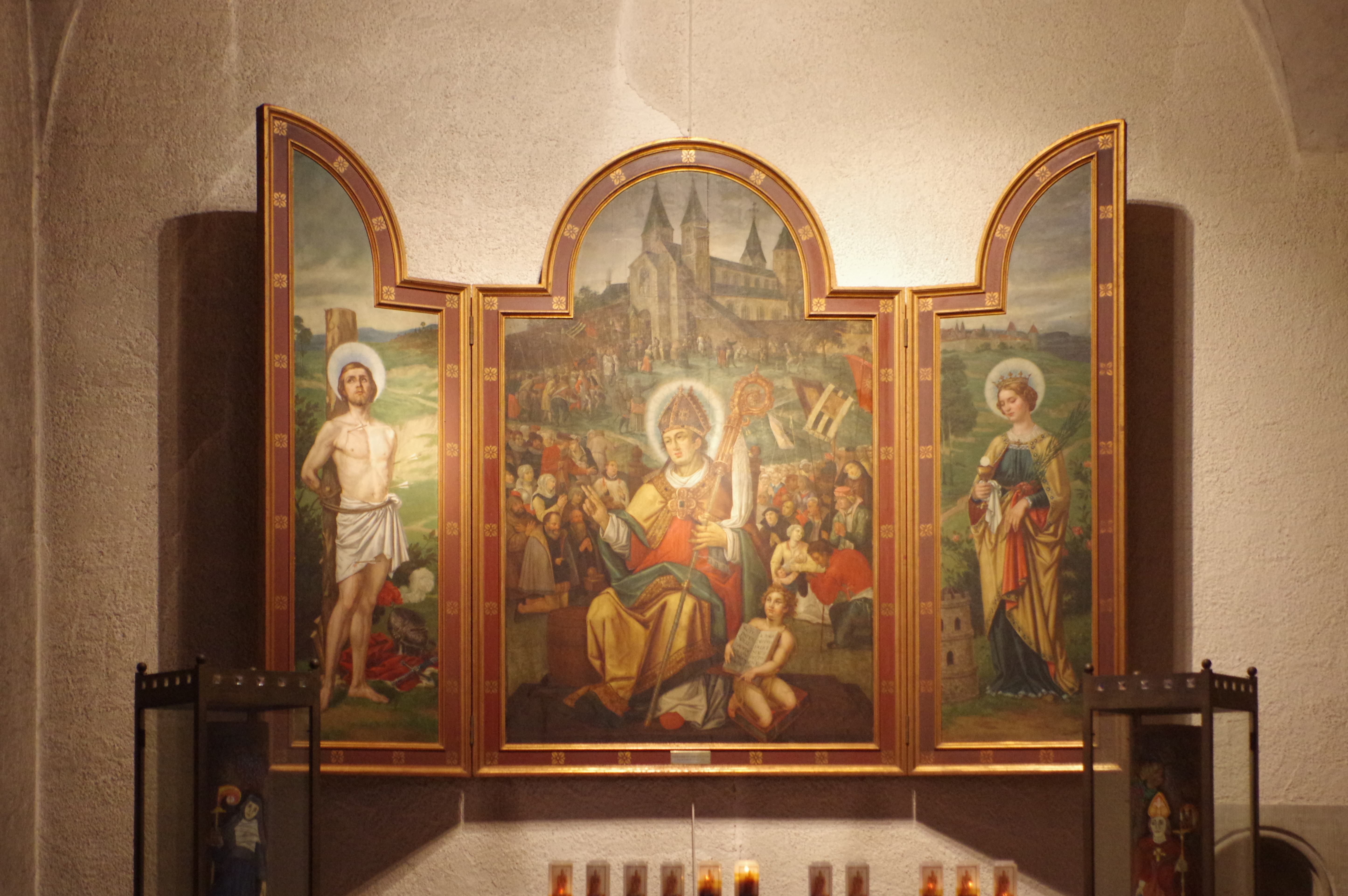 Luxemburg, Echternach, St. Willibrord Basilika